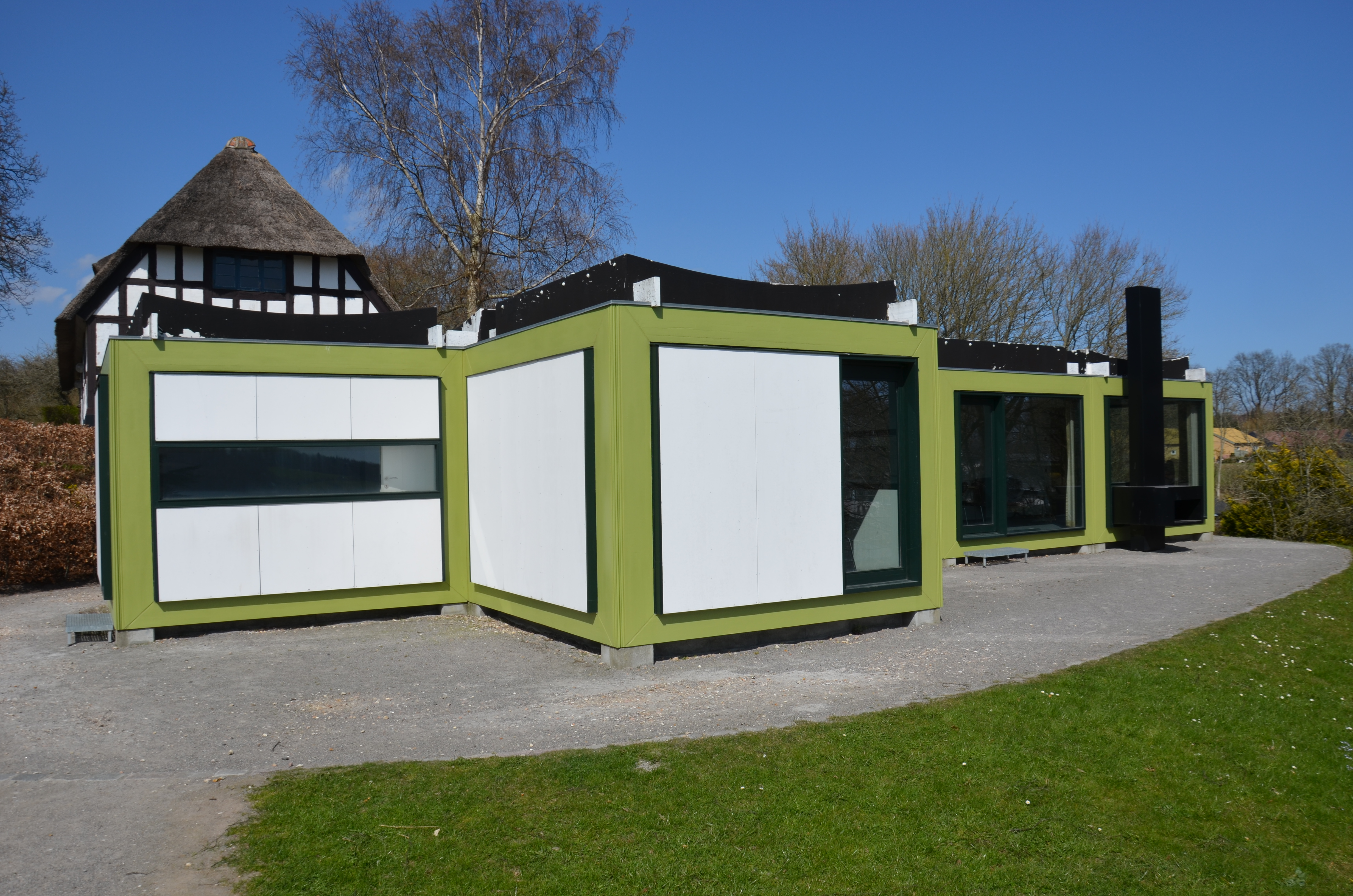 Arne Jacobsen's Kubeflex, exteriör